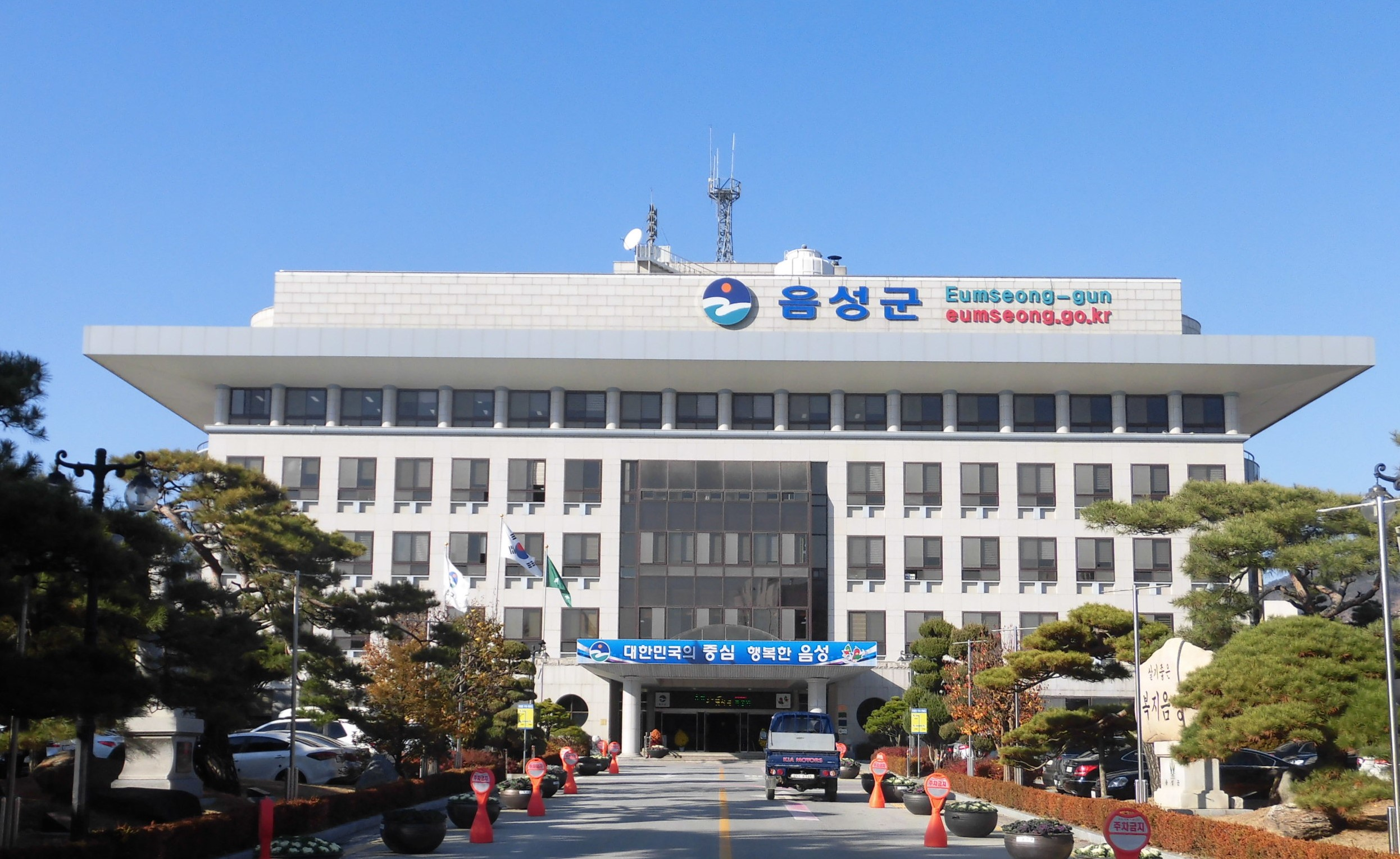 충청북도 음성군에 있는 음성군청